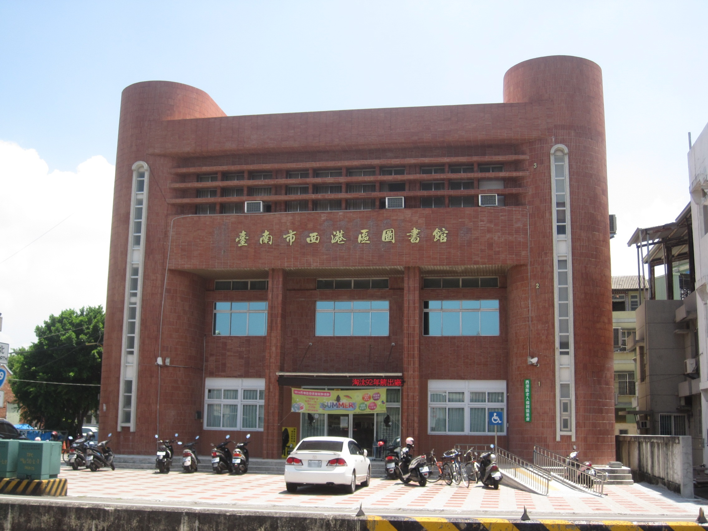 臺南市西港區圖書館